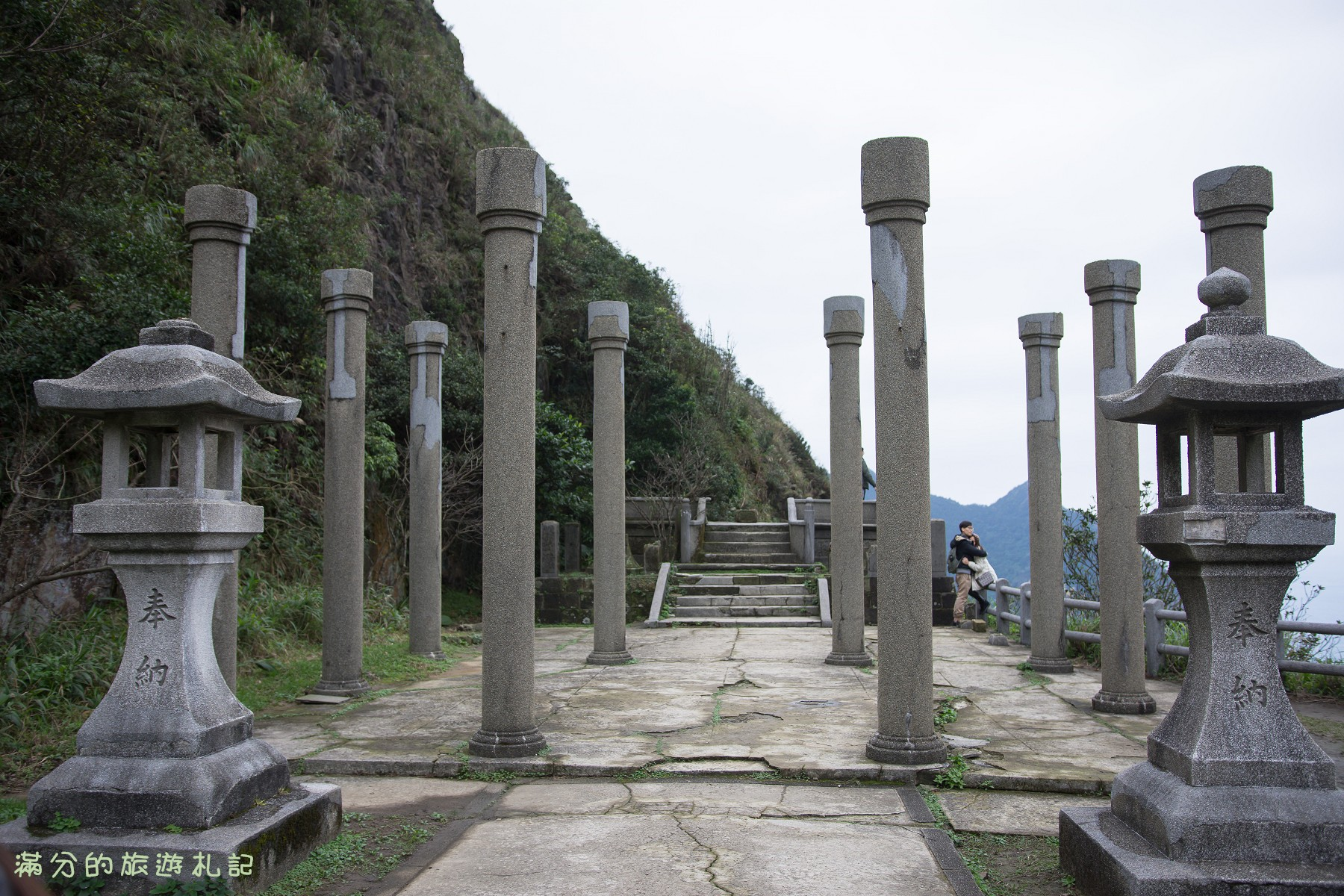 新北-金瓜石神社